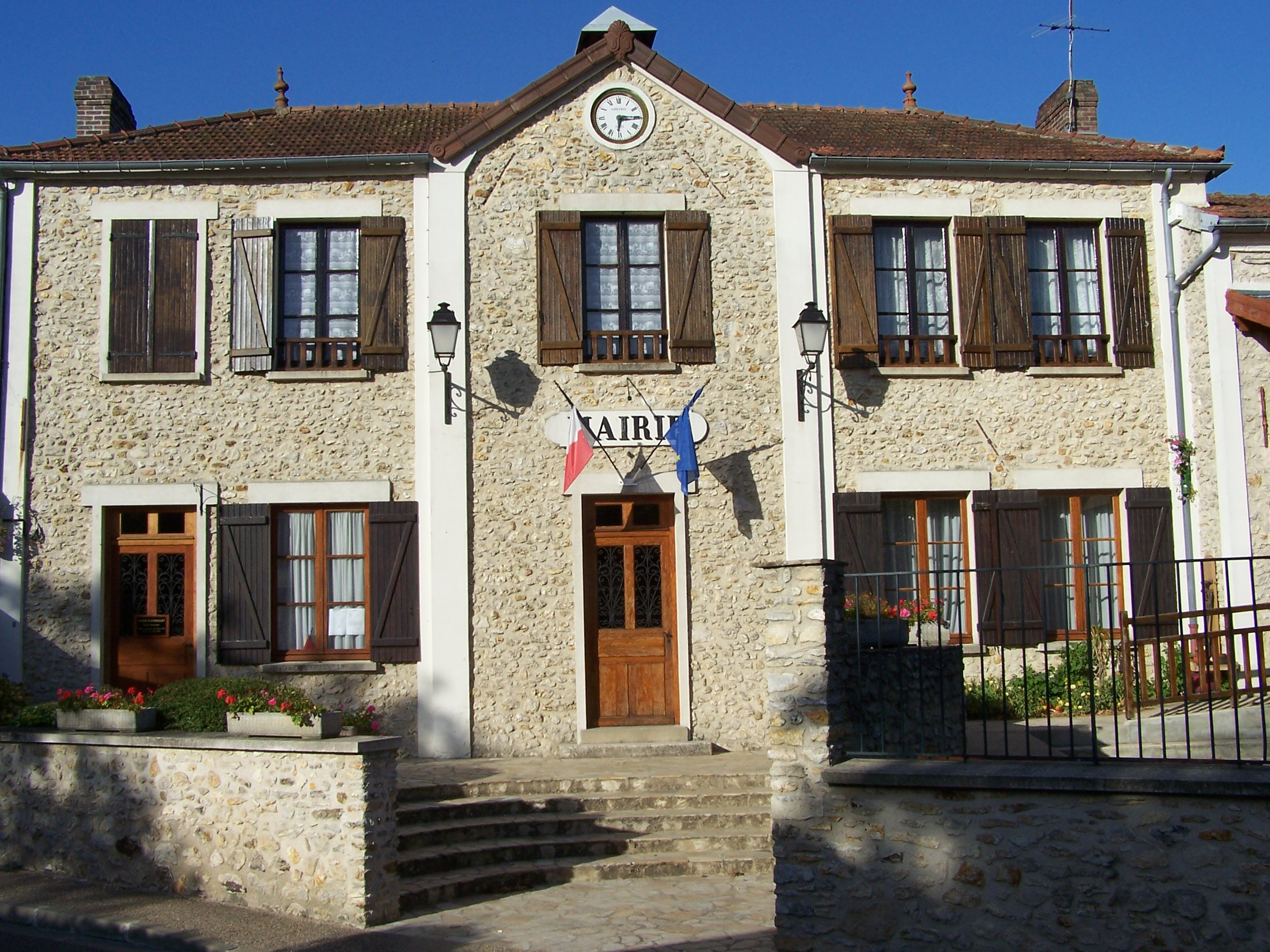 Mairie d'Autouillet (Yvelines, France)